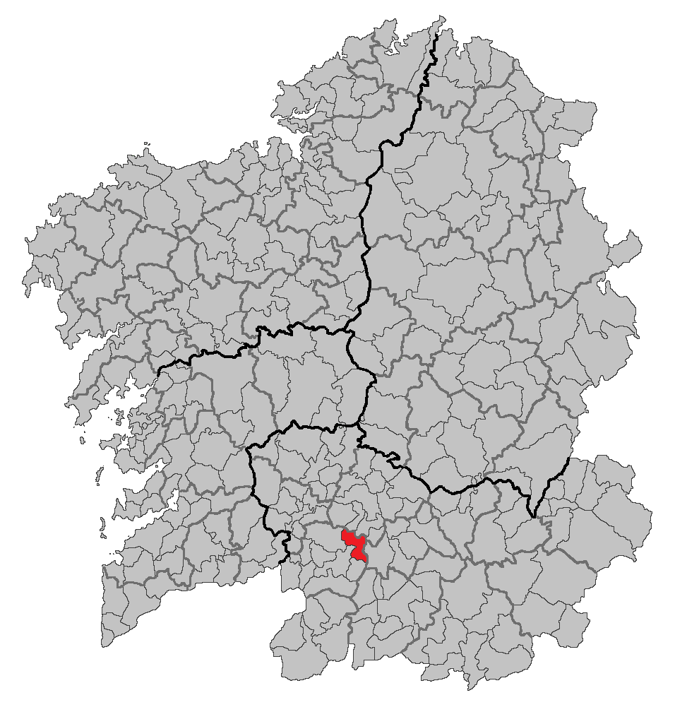 Mapa coa localización do concello de A Merca.